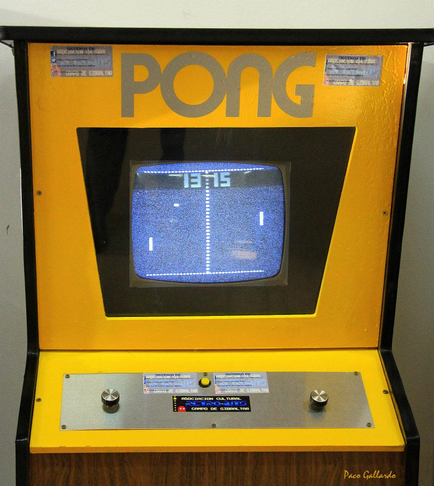 Pong bideojokoen areto negusiko lehen jokua